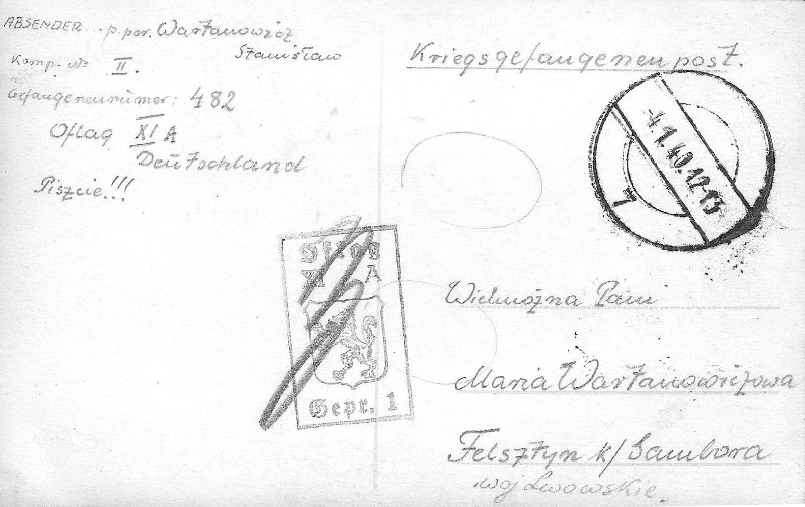 Odwrotna strona zdjęcia z Oflagu XIA, przesłanego do domu w formie kartki pocztowej przez ppor. Stanisława Wartanowicza.